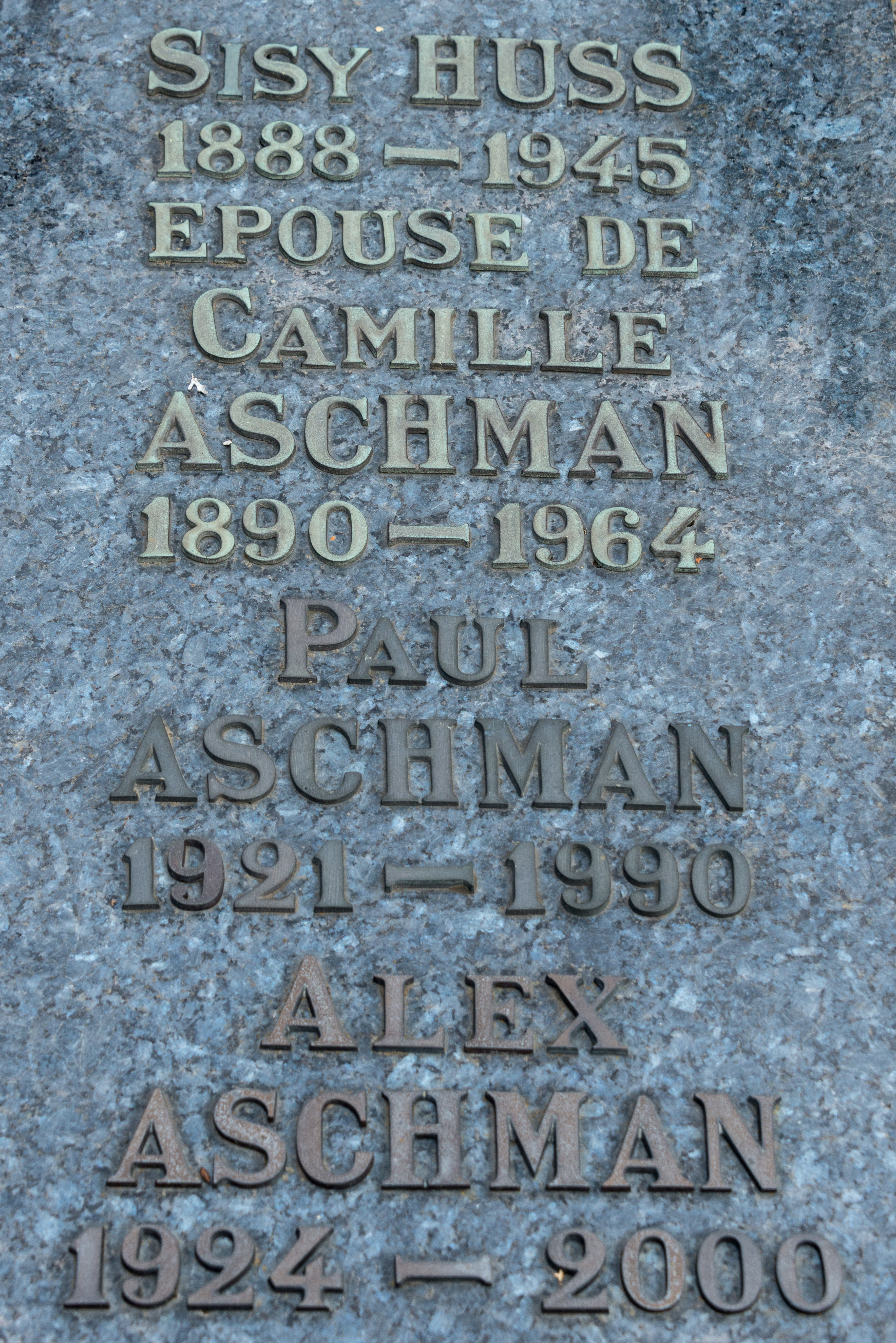 De Pol Aschman läit am Familljegraf Aschman-Huss um Nikloskierfecht begruewen.